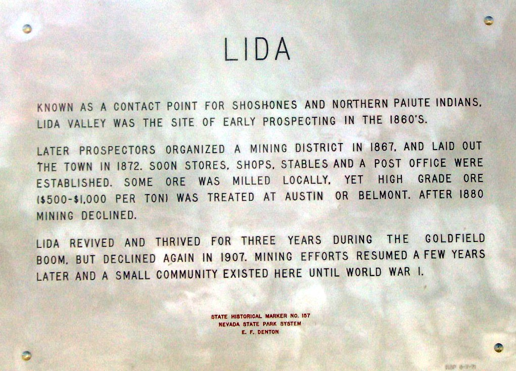 Sign marker for Lida, Nevada.